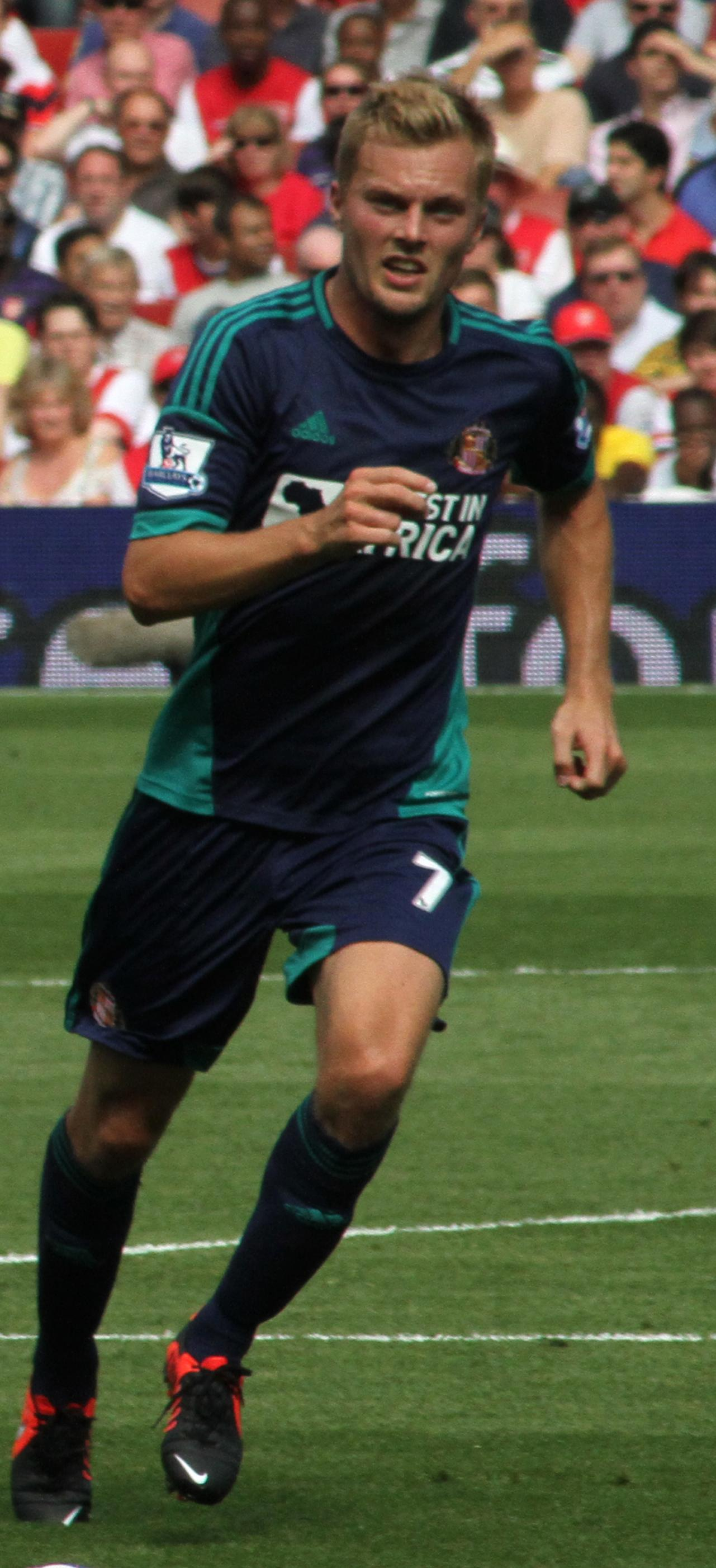 Per Mertesacker & Seb Larsson